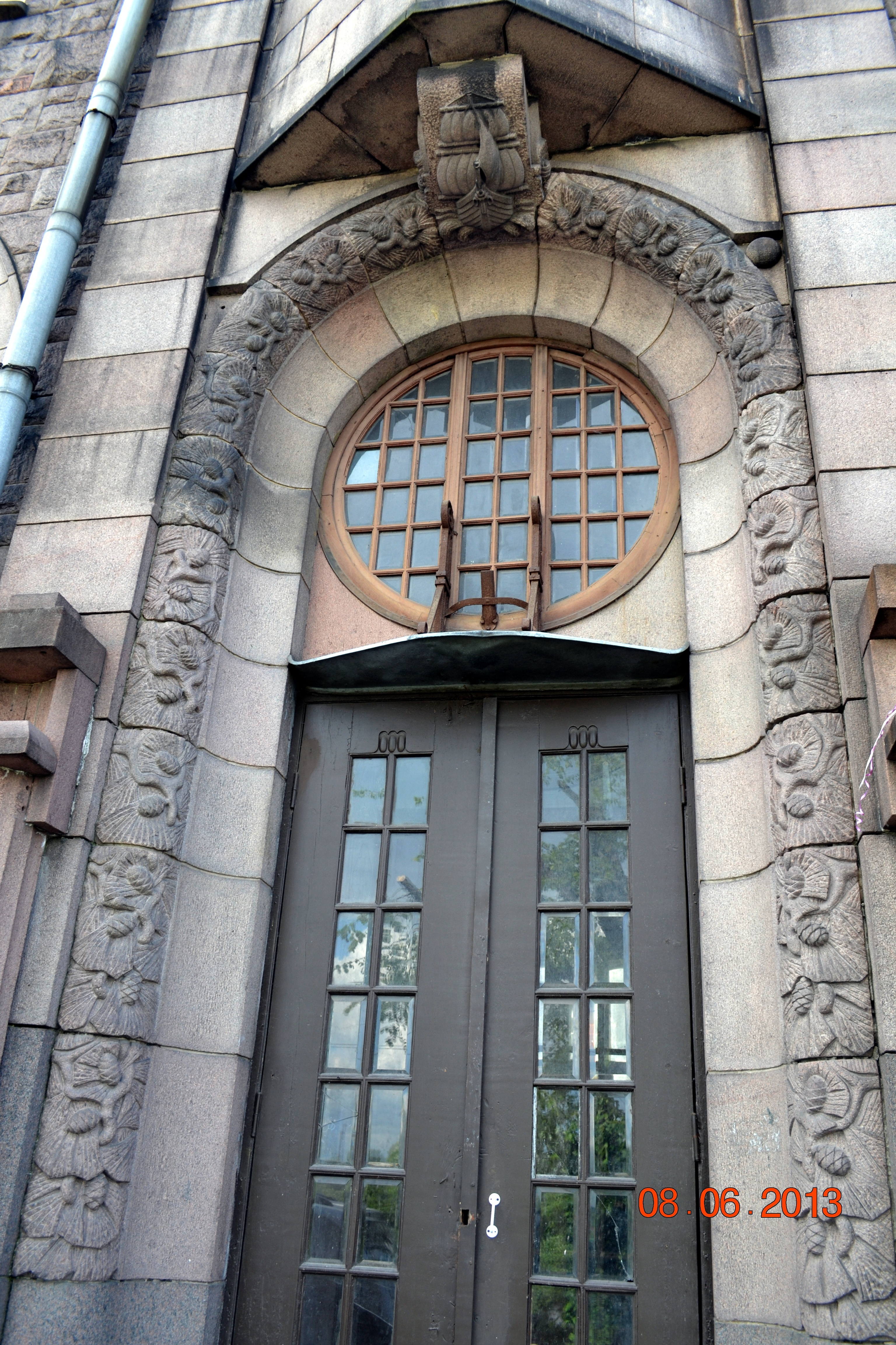 Здание фирмы хаакмен и к (Санкт-Петербург и Лен.область, Выборг, подгорная улица, 14, северный вал, 5)